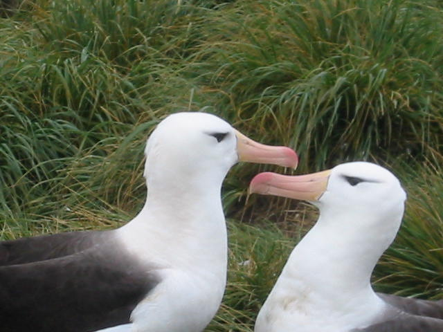 Albatros